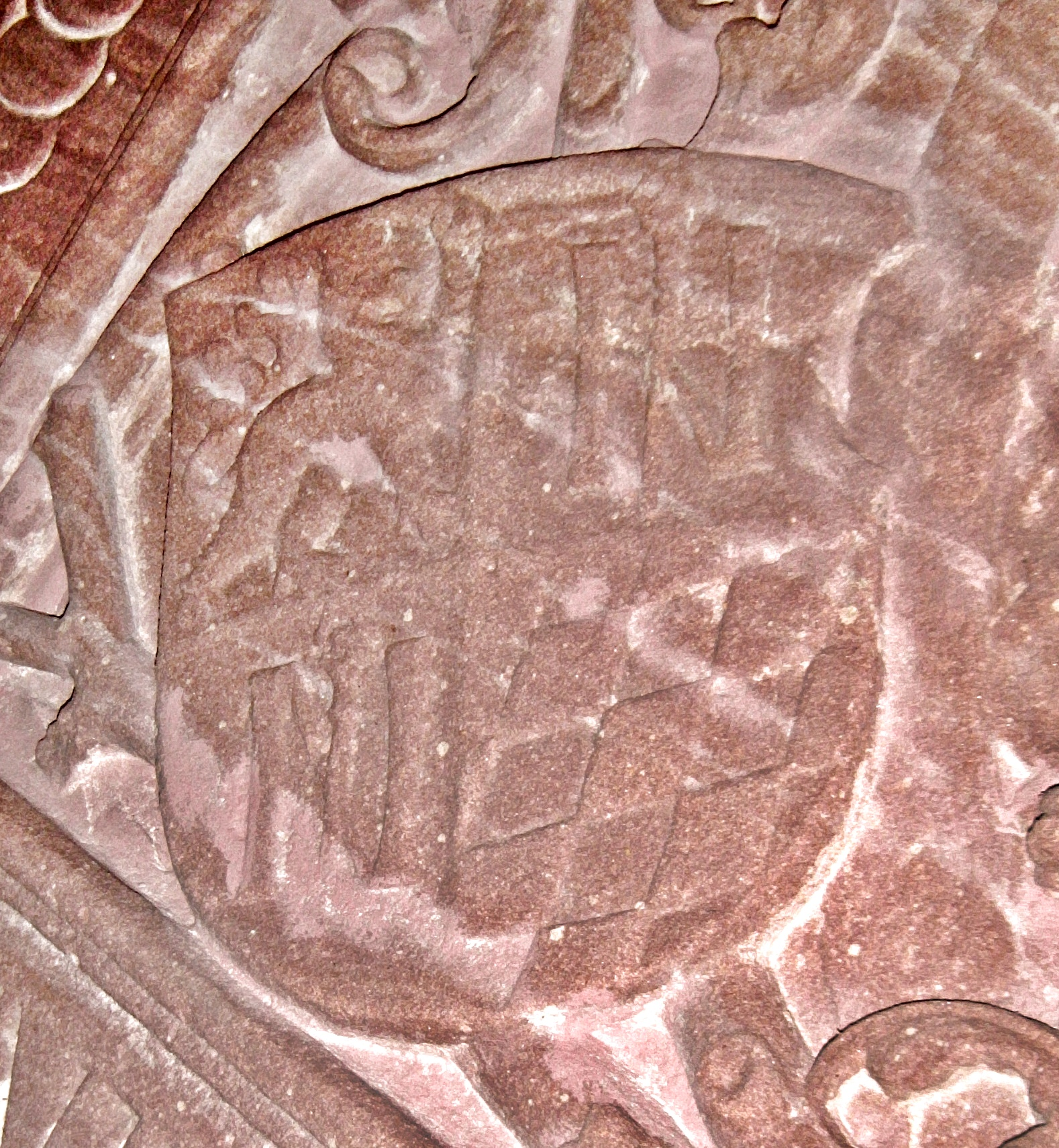 Prinzessin Katharina von der Pfalz (1499-1526), Äbtissin des Klosters Neuburg bei Heidelberg, persönliches Wappen auf der Grabplatte in der dortigen Klosterkirche.